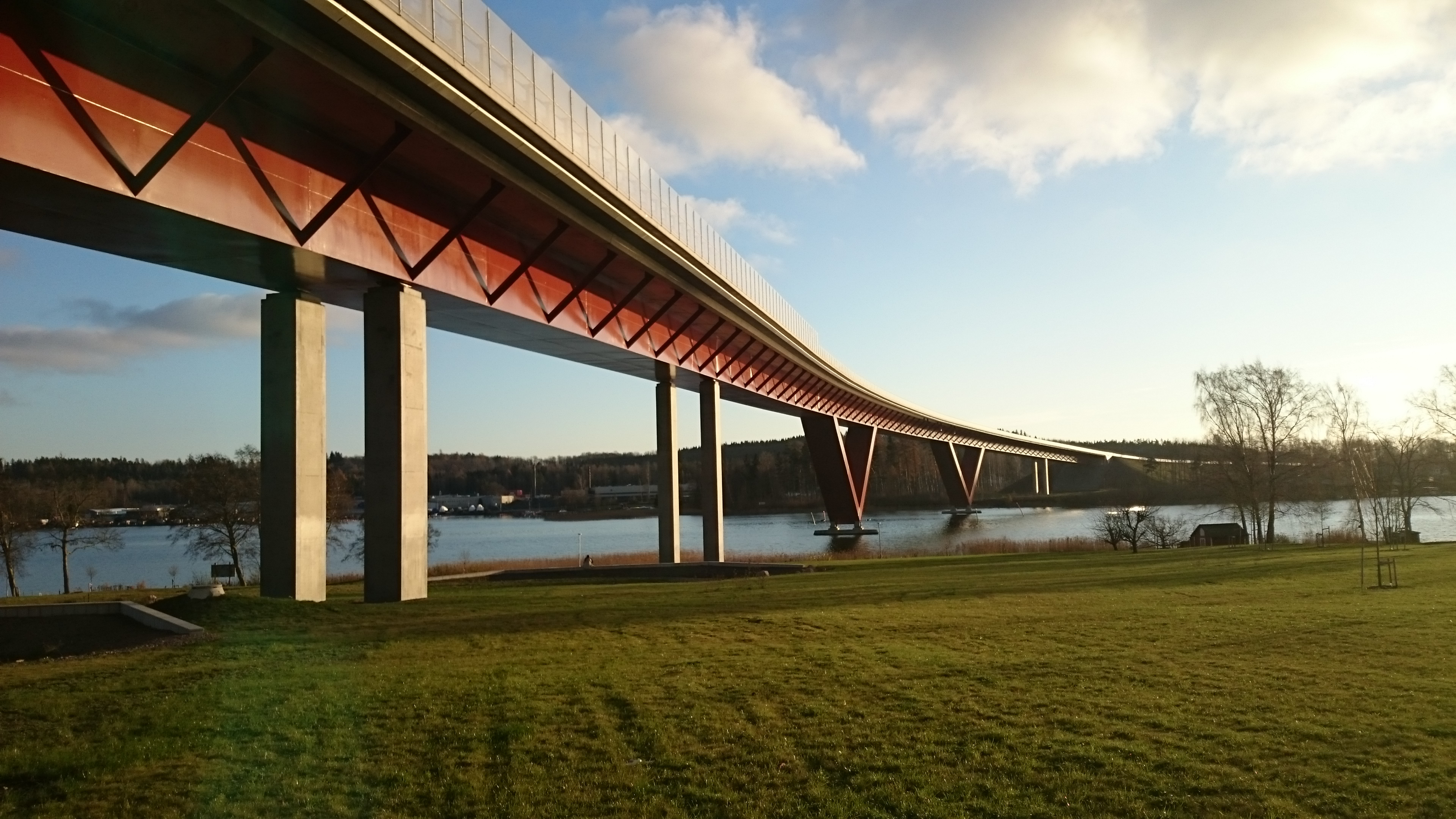 Bron över skepparpinan i Motala